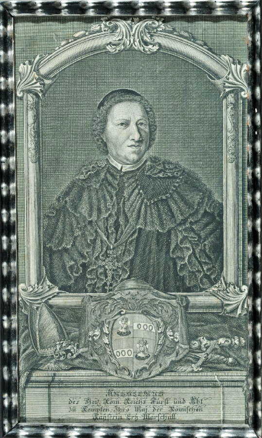 Anselm Reichlin von Meldegg, Fürstabt des Fürststifts Kempten